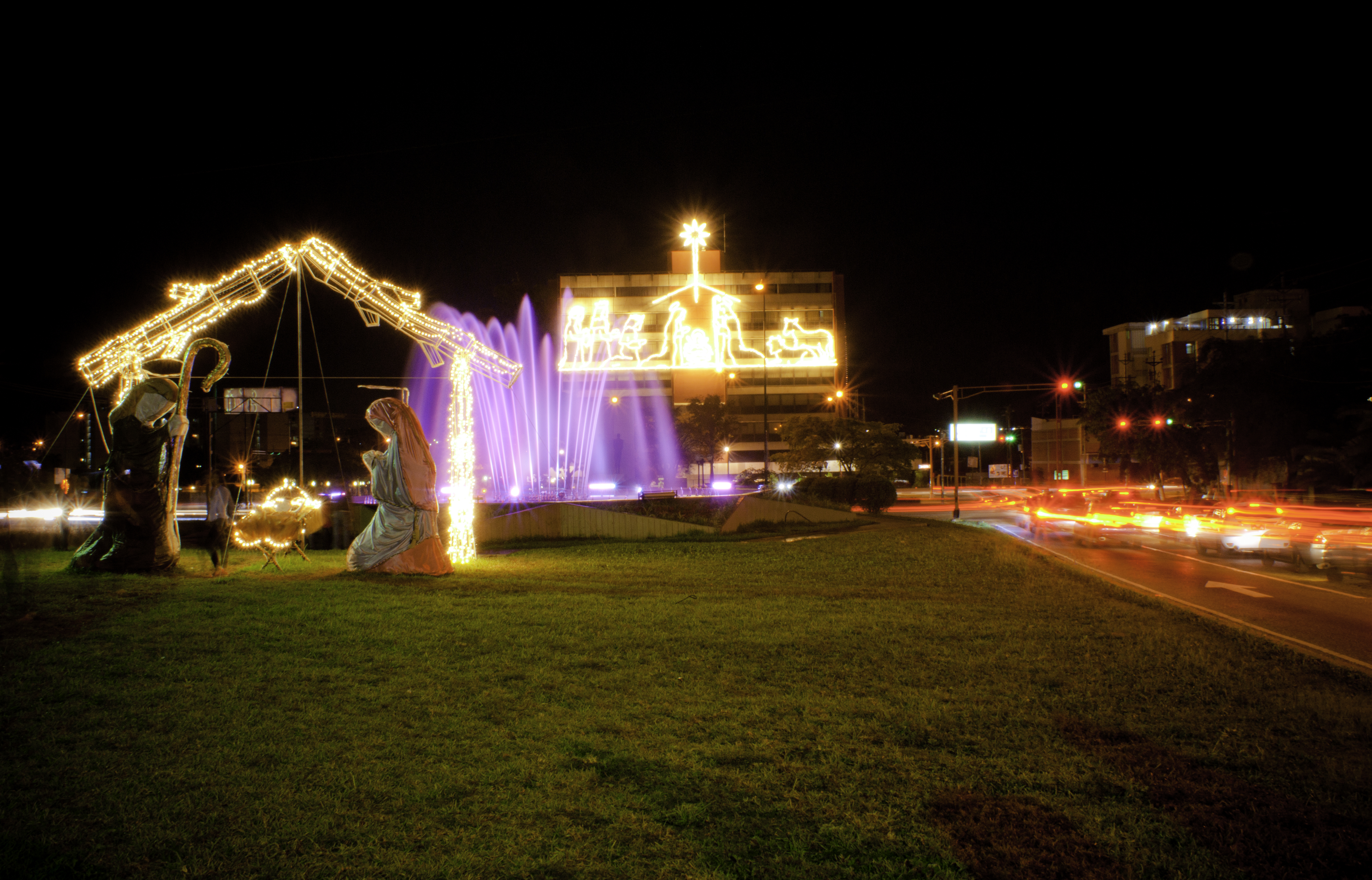 Avenida Venezuela con Avenida los Leones. Barquisimeto (Diciembre 2010)